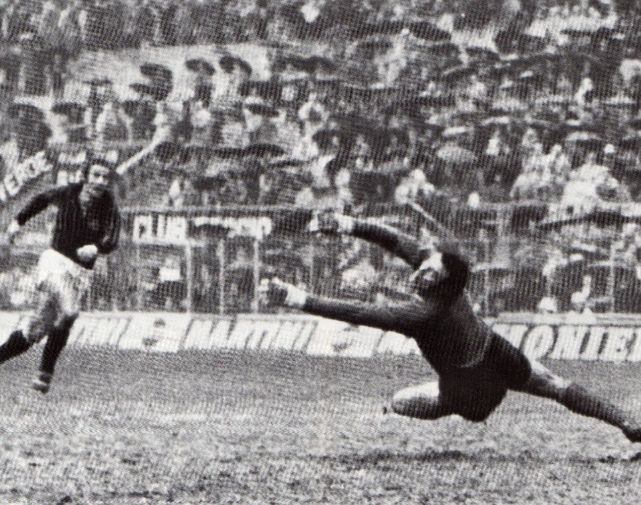 Milano, stadio San Siro, 9 gennaio 1974. L'attaccante rossonero Luciano Chiarugi (a sinistra) batte il portiere ajacide Heinz Stuy (a destra) e realizza la decisiva rete (1-0) nella finale di andata della Supercoppa UEFA 1973 tra gli italiani del Milan, detentori della Coppa delle Coppe 1972-73, e gli olandesi dell'Ajax, detentori della Coppa dei Campioni 1972-73; gli ajacidi ribalteranno poi l'esito del doppio confronto nella gara di ritorno, giocata sette giorni più tardi all'Olympisch Stadion di Amsterdam e vinta in goleada (6-0). Si trattò della prima edizione ufficialmente sotto l'egida dell'UEFA per questo trofeo, dopo l'esordio ufficioso del 1972.